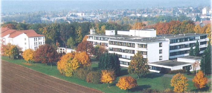 St. Rochus Krankenhaus 1975